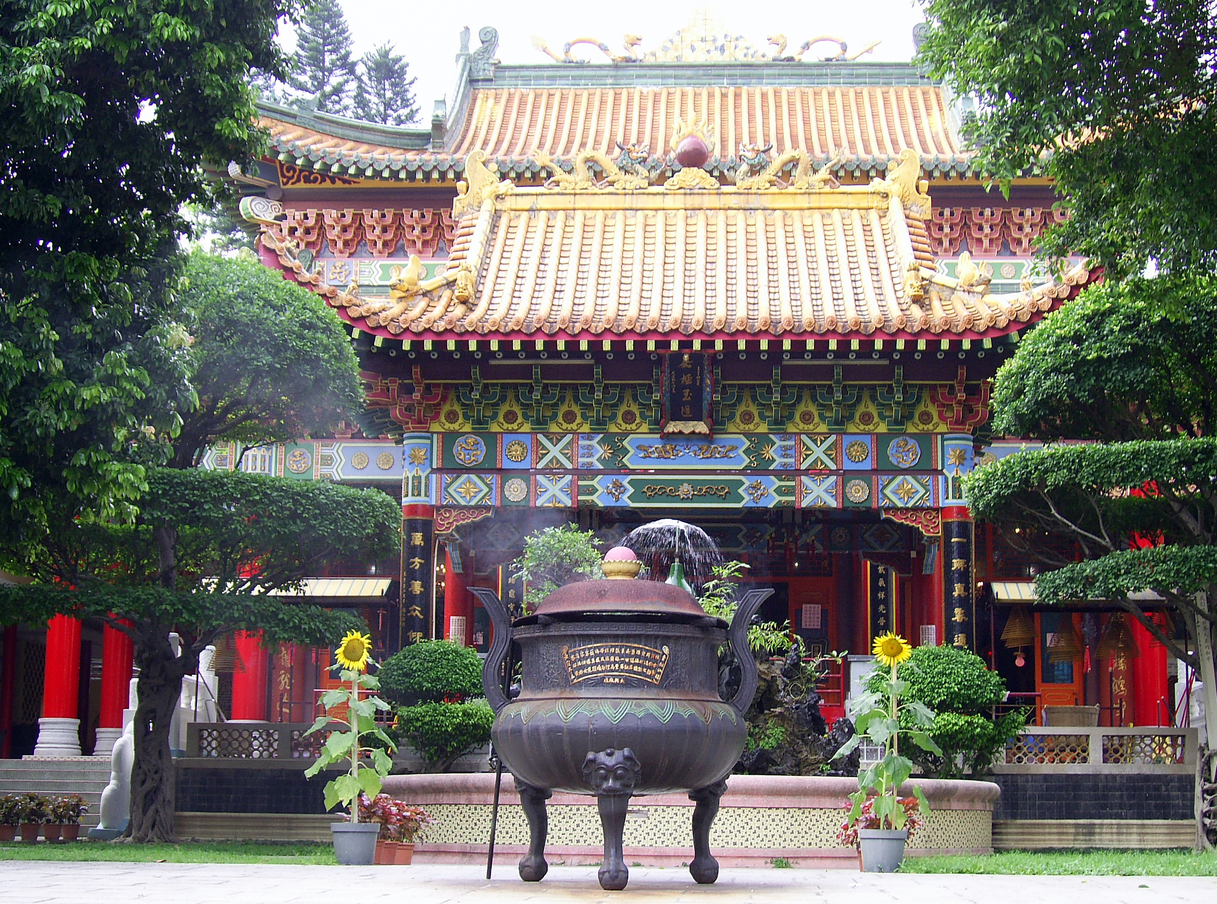 中文（香港）: 青松觀純陽殿